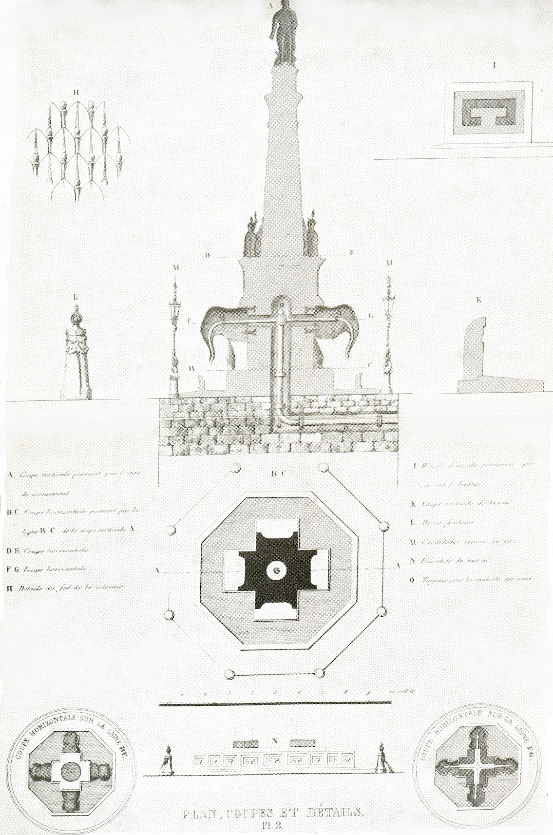 Plan de la fontaine des éléphants à Chambéry en France dans le département de la Savoie. Il s'agit d'un plan réalisé en 1838. Œuvre libre de droit, domaine public.